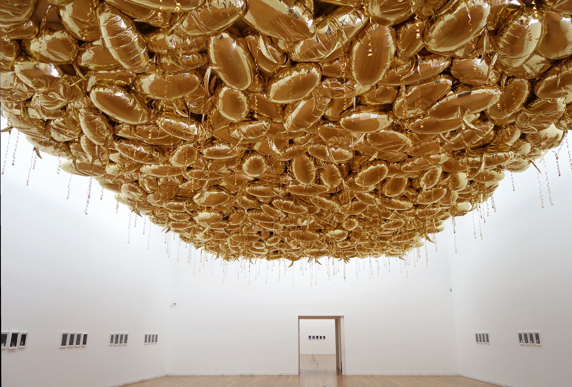 portugal porto serralves contemporaryart frenchart installation philippeparreno museum